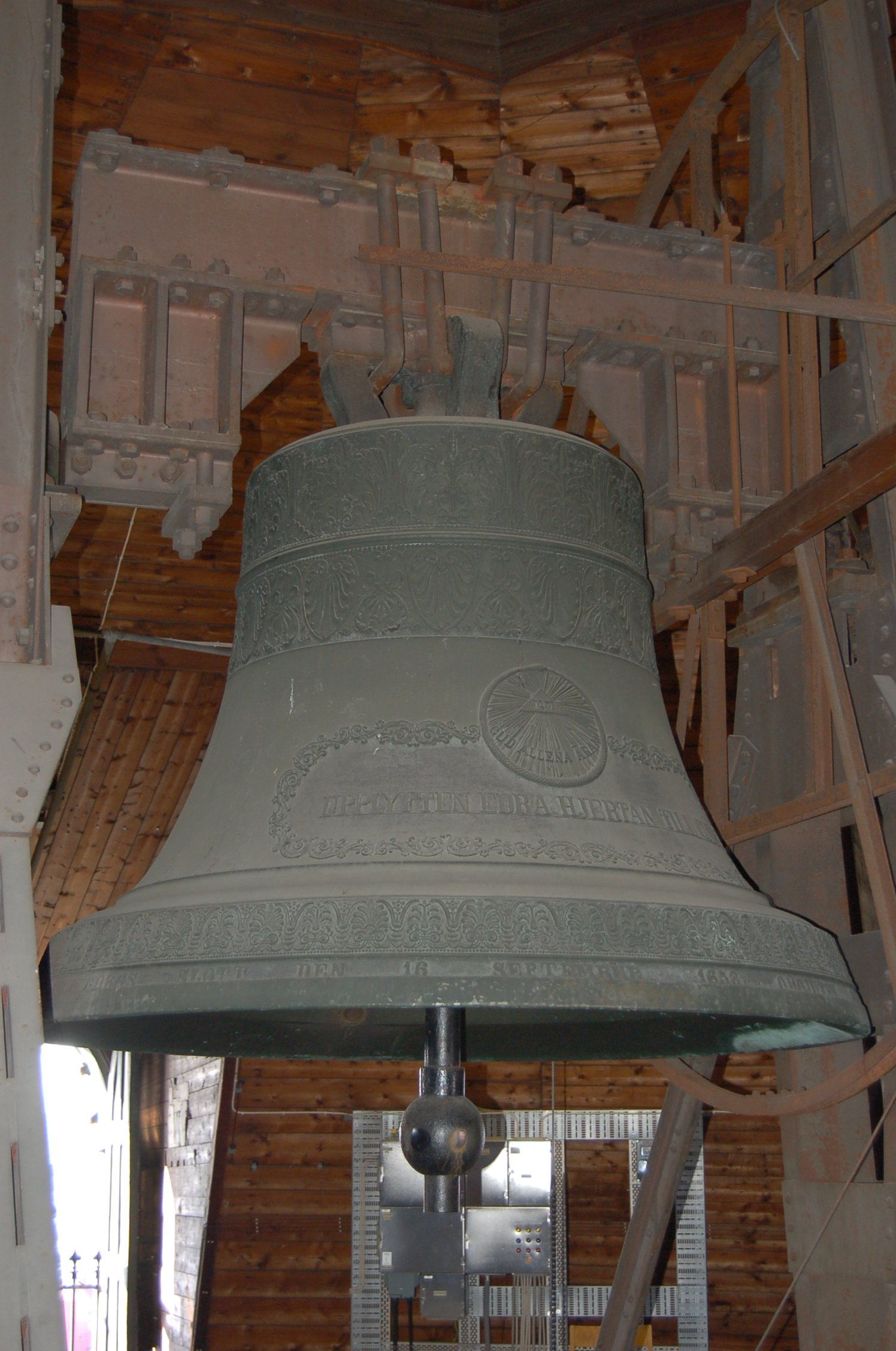 Storklockan i Hedvig Eleonora kyrka i Stockholm.